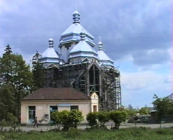 Будівництво нового мурованого храму Святого Миколая в Радехові